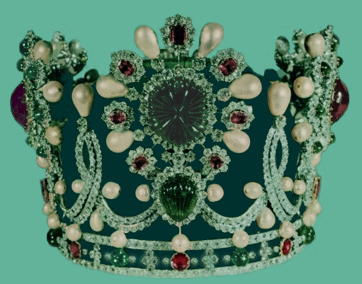 Couronne de l'Impératice